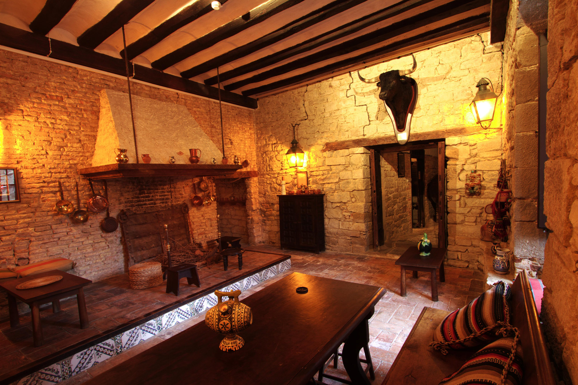 Antebodega del Palacio de los Mencos en Tafalla (Navarra).